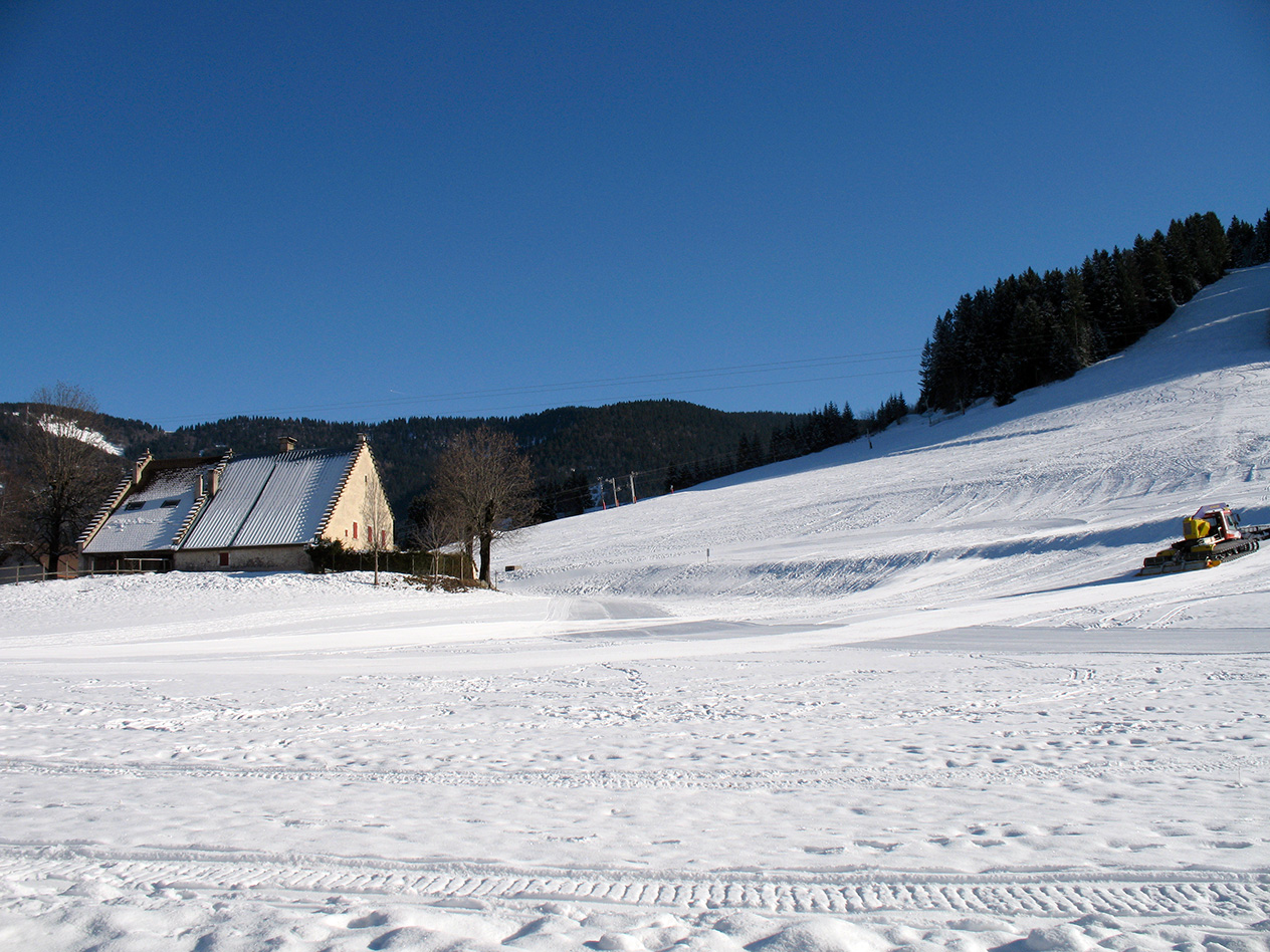 Autrans sous la neige lors des rencontres 2009 des acteurs de l’internet